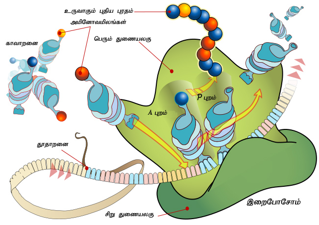 இறைபோசோமில் தூதாறனை மொழிமாற்றப்படல்